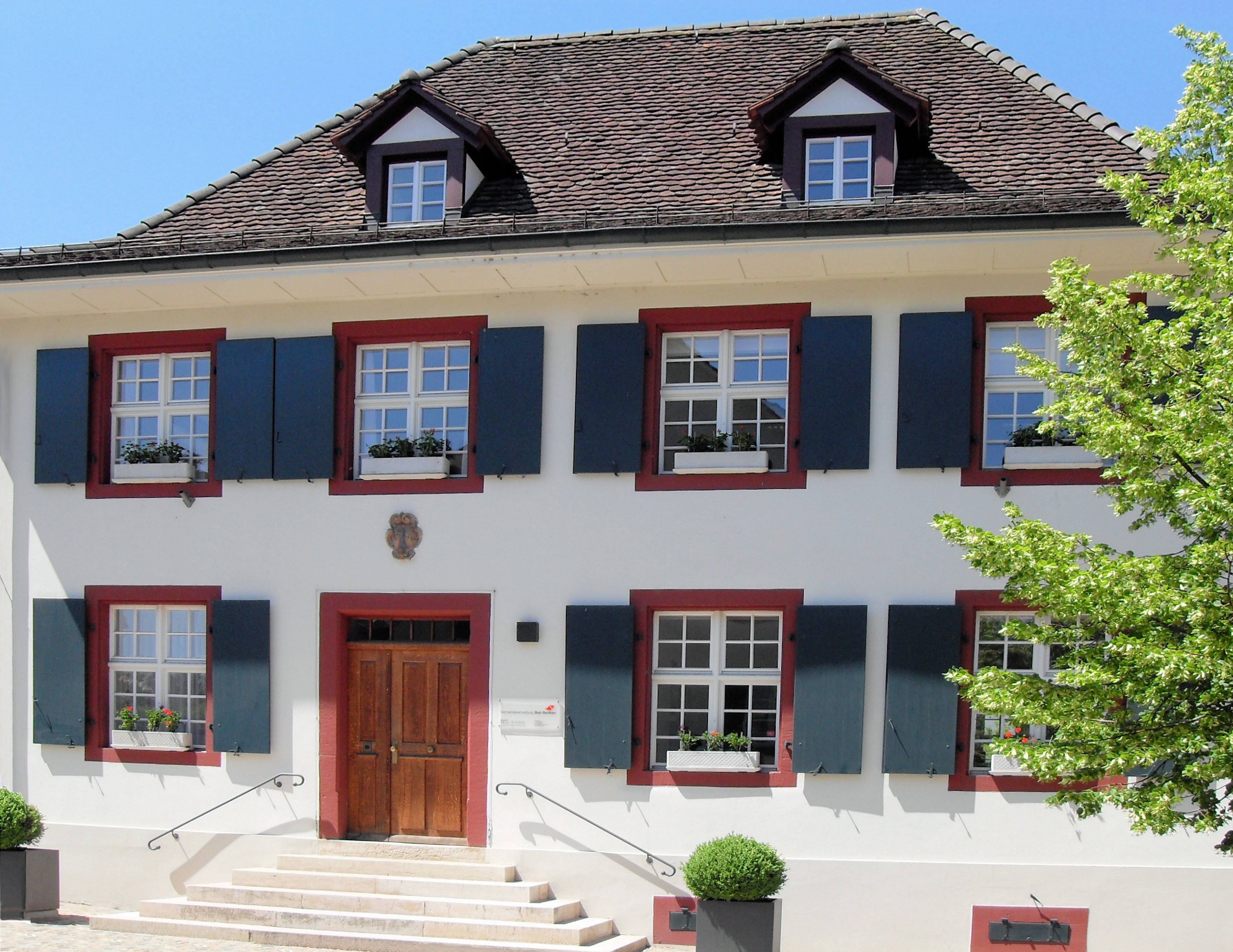 Gemeindeverwaltung Biel-Benken, Kanton Basel-Landschaft, Schweiz